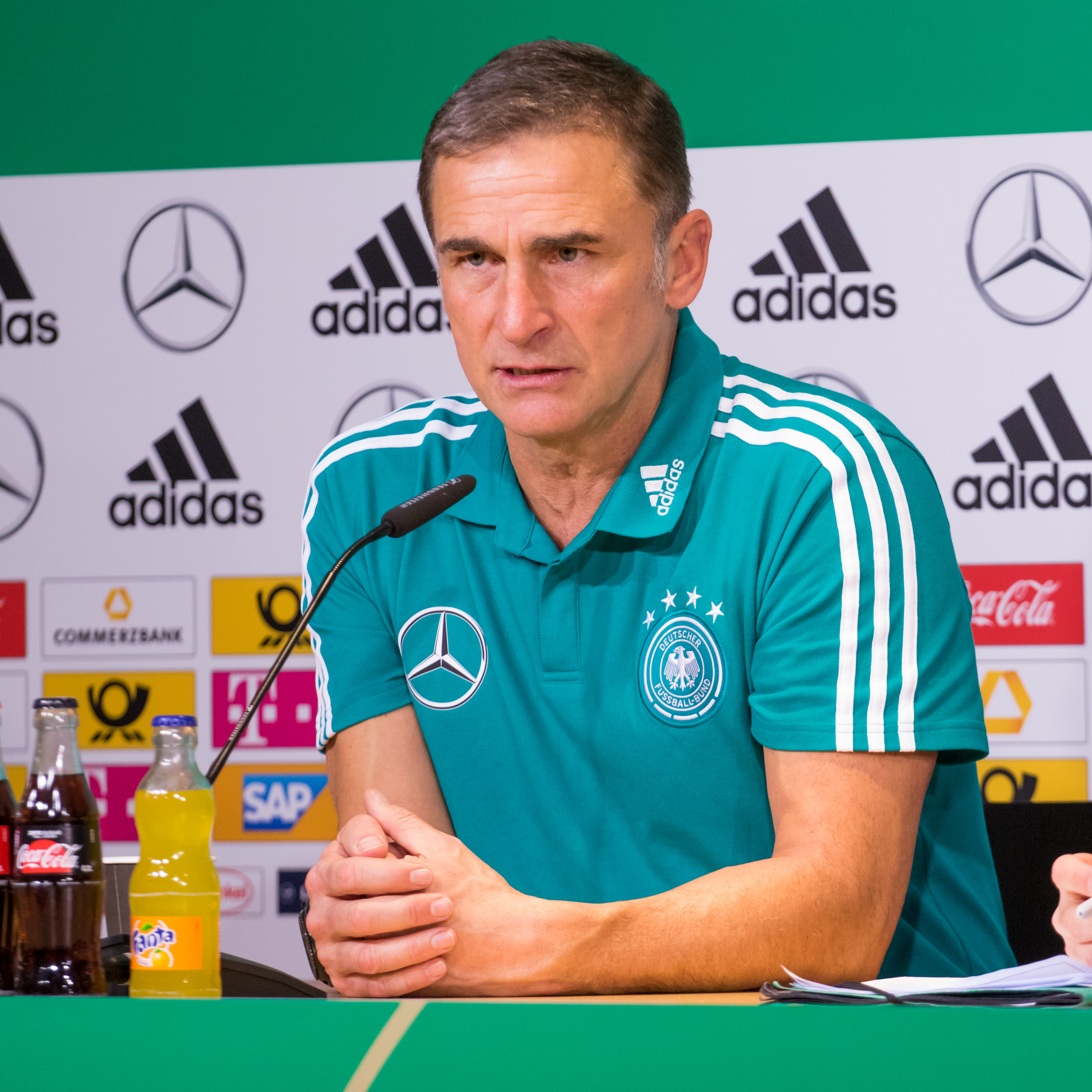 Stefan Kuntz auf der Pressekonferenz nach dem Spiel Deutschland vs. Israel (U21 EM-Qualifikation) am 22. März 2018